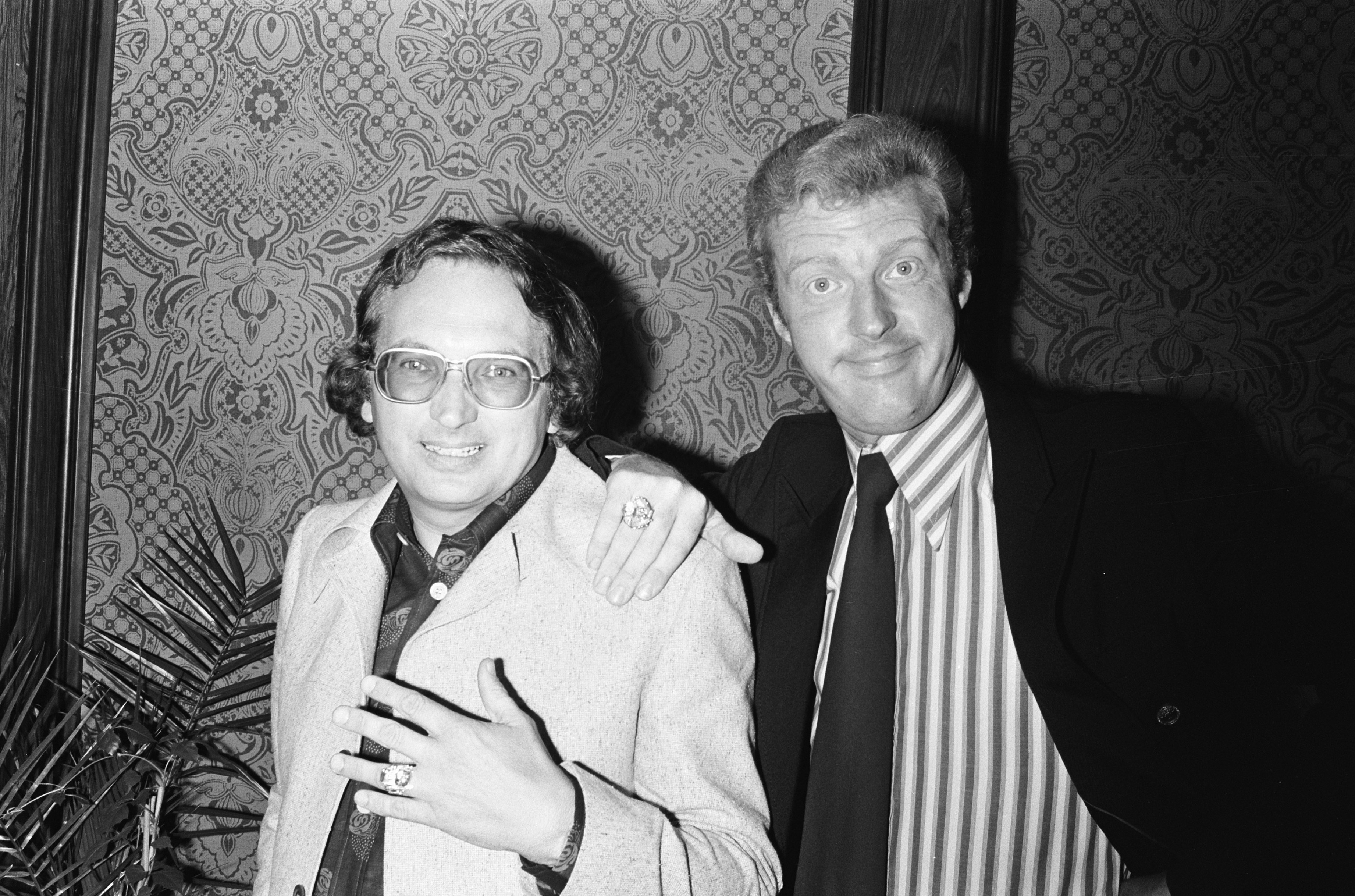 Collectie / Archief : Fotocollectie Anefo Reportage / Serie : Uitreiking van de Gouden Televizier-Ring in Amsterdam Beschrijving : Frans van Dusschoten (links) en André van Duin met de ring Datum : 24 mei 1975 Locatie : Amsterdam, Noord-Holland Trefwoorden : komieken, ringen Persoonsnaam : Duin, André van, Dusschoten, Frans van Fotograaf : Fotograaf Onbekend / Anefo Auteursrechthebbende : Nationaal Archief Materiaalsoort : Negatief (zwart/wit) Nummer archiefinventaris : bekijk toegang 2.24.01.05 Bestanddeelnummer : 927-9460